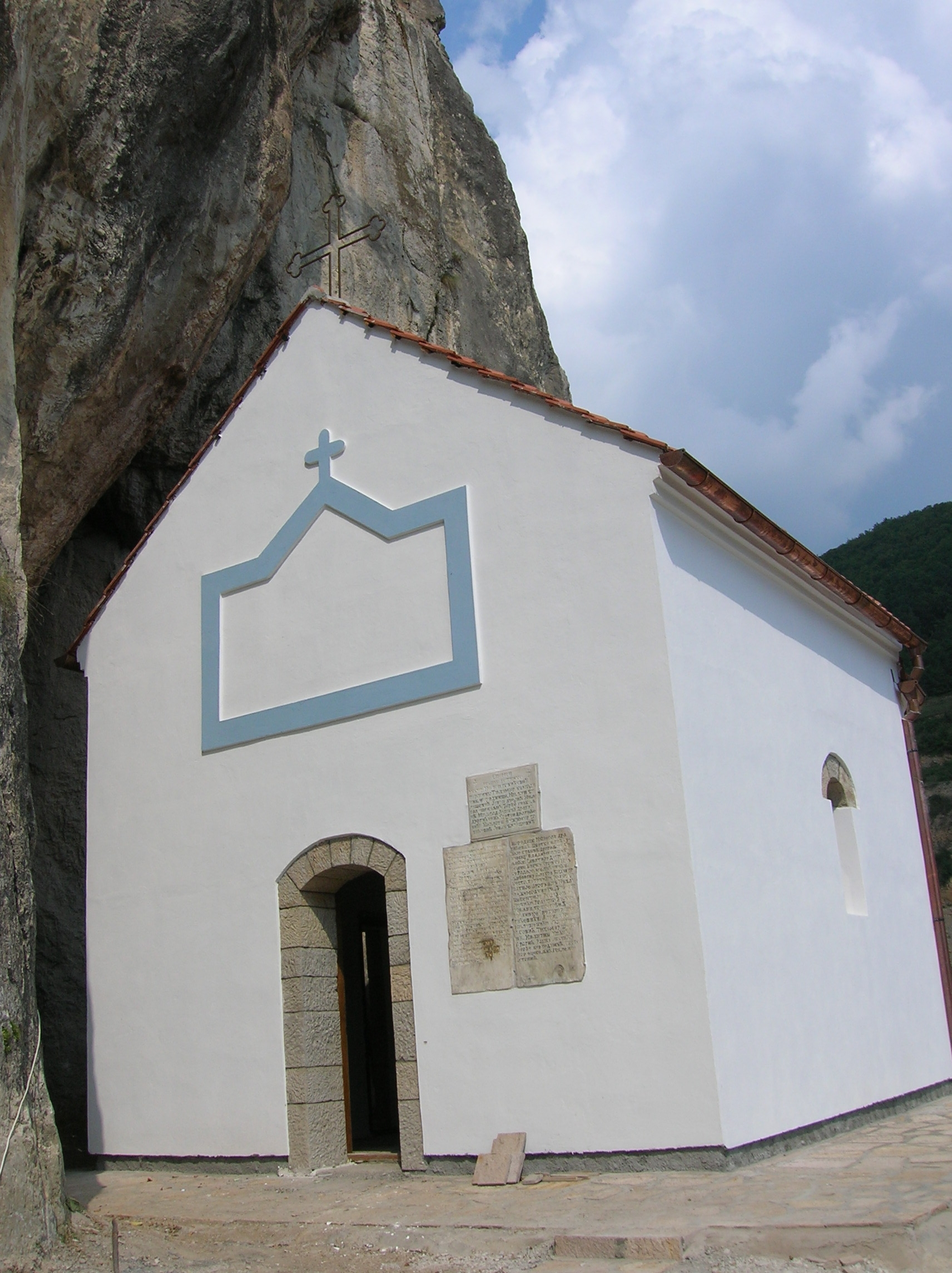 Crkva Sv. Mihaila u Lisi